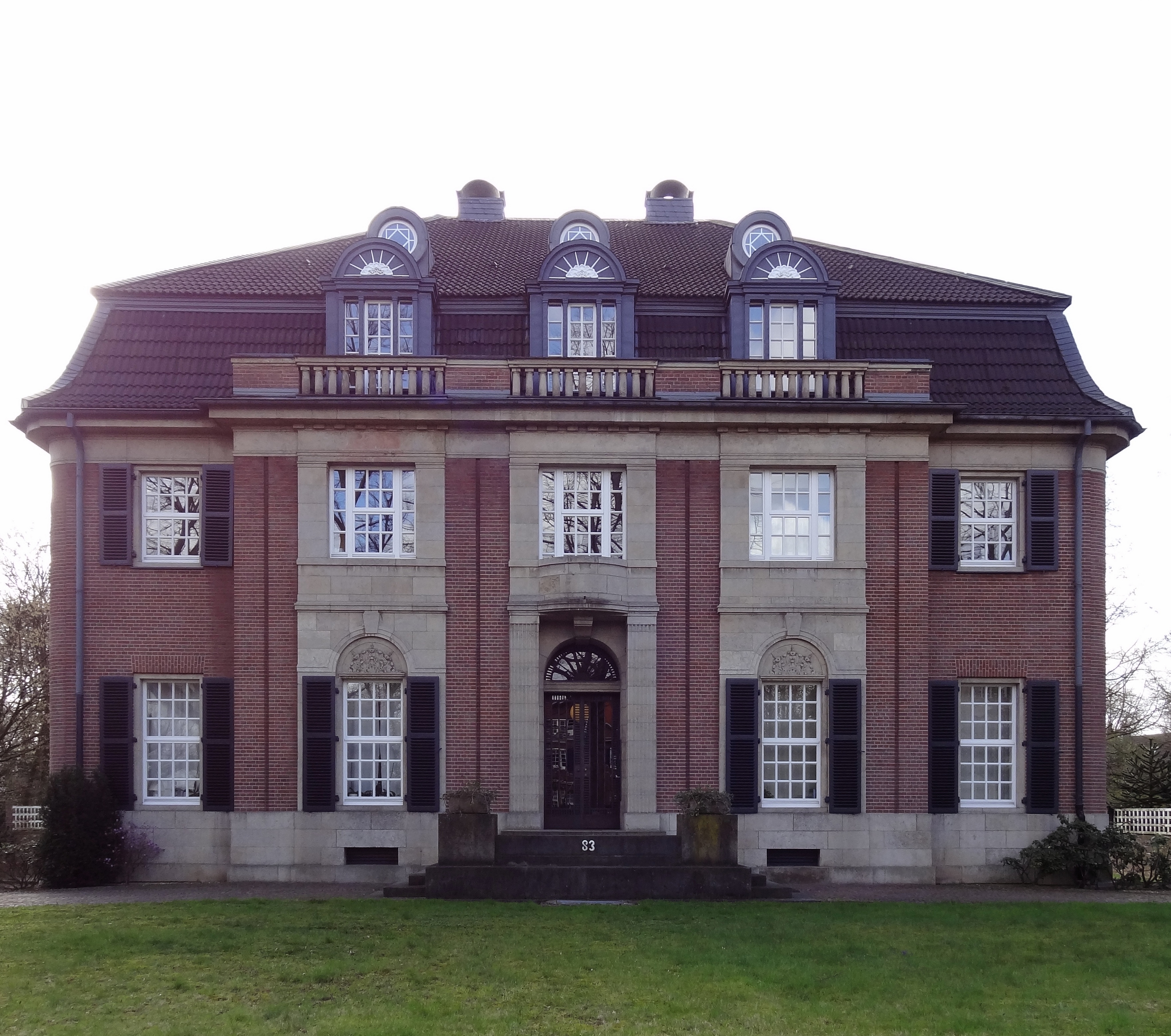 Krefeld, Wilhelmshofallee 83; Denkmalliste 283